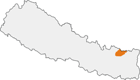 Położenie Parku Narodowego Makalu-Barun (Makalu-Barun National Park)